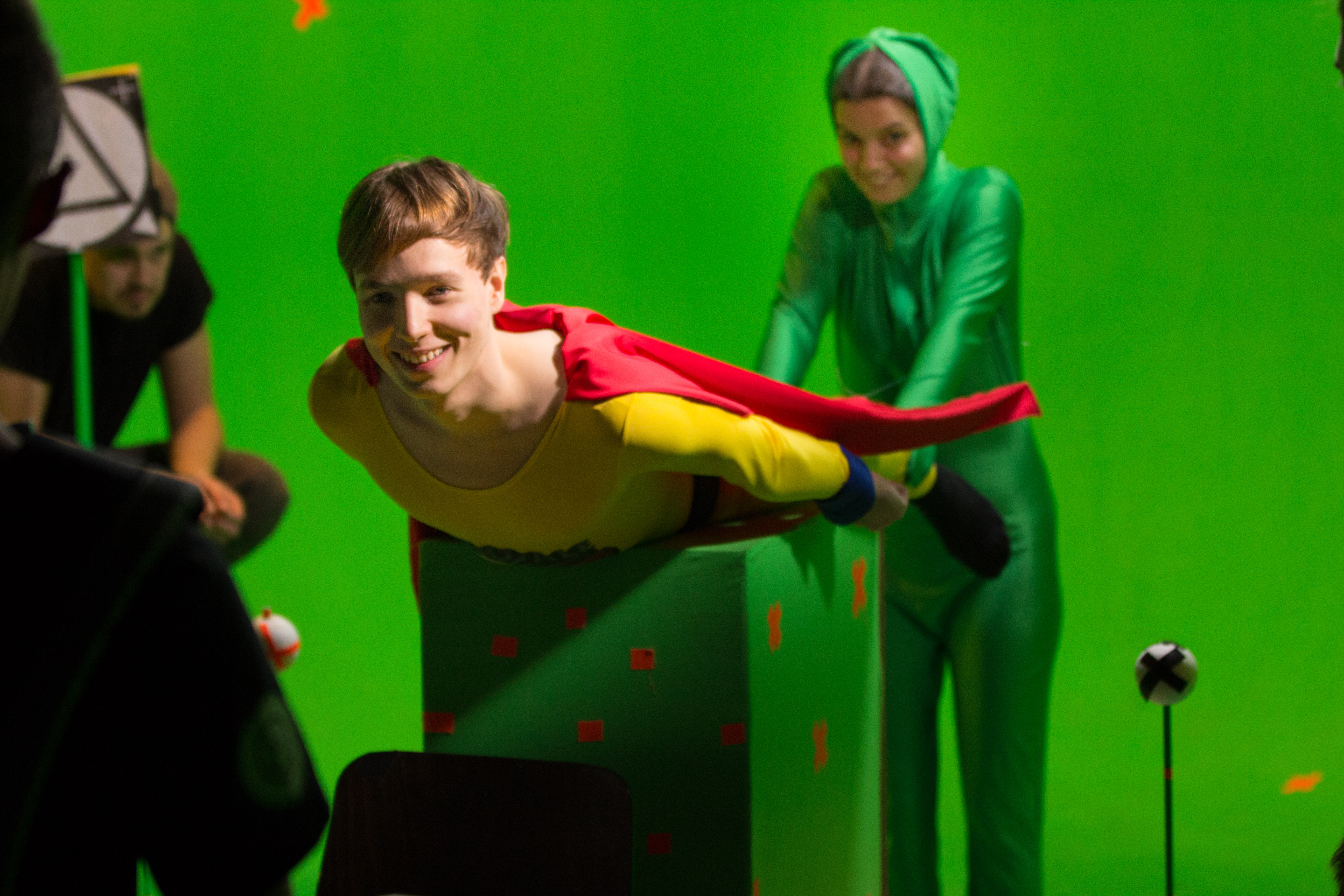 Yannic Lippe als Hero bei den Dreharbeiten zum Kurzfilm „Be(er) a Hero“